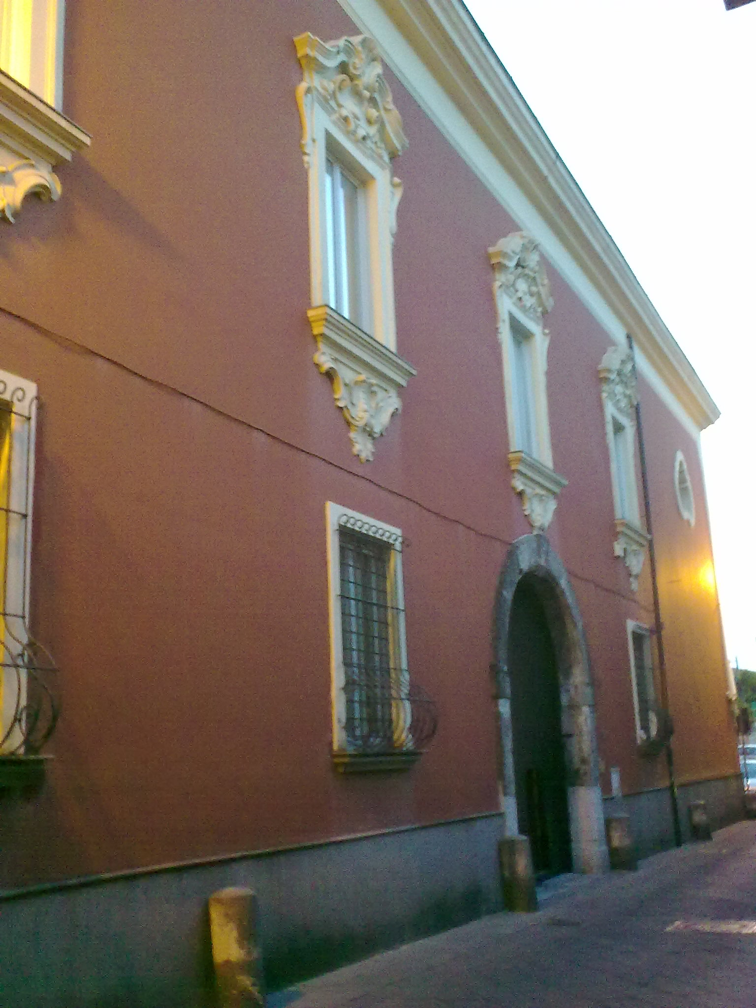 Curia Diocesana del Borgo Vescovado, Nocera Inferiore